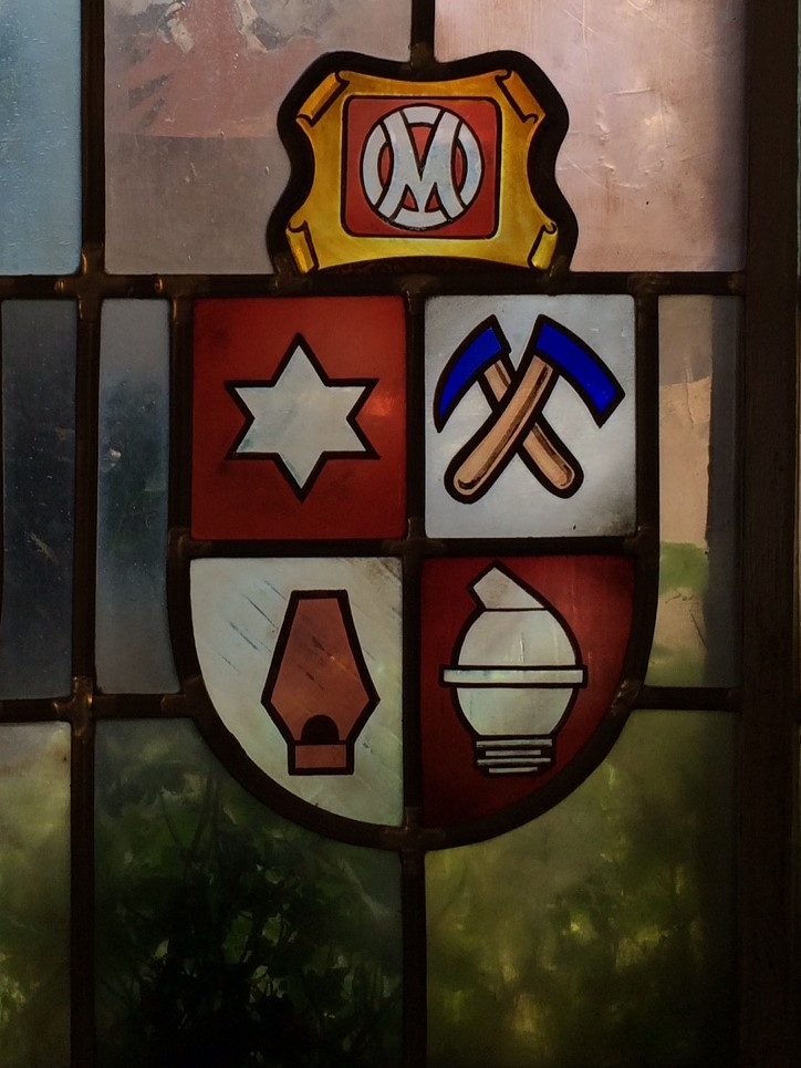 Emblème de la société Ougrée Marihaye sur un vitrail de la Croix Rouge de Belgique